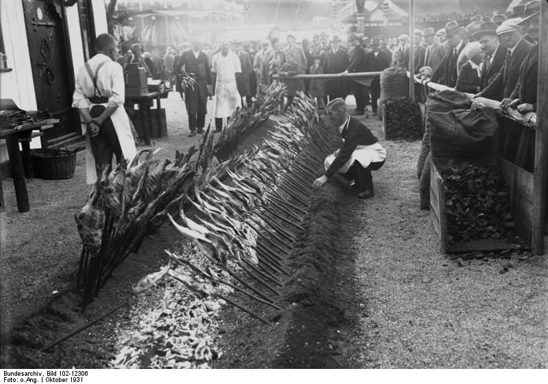 Das Münchener Oktoberfest auf der Theresienwiese hat begonnen ! Das Steckelfischbraten auf glühenden Kohlen, welche vom Spiess direkt verkauft werden, eine Delikatesse auf der Festwiese.